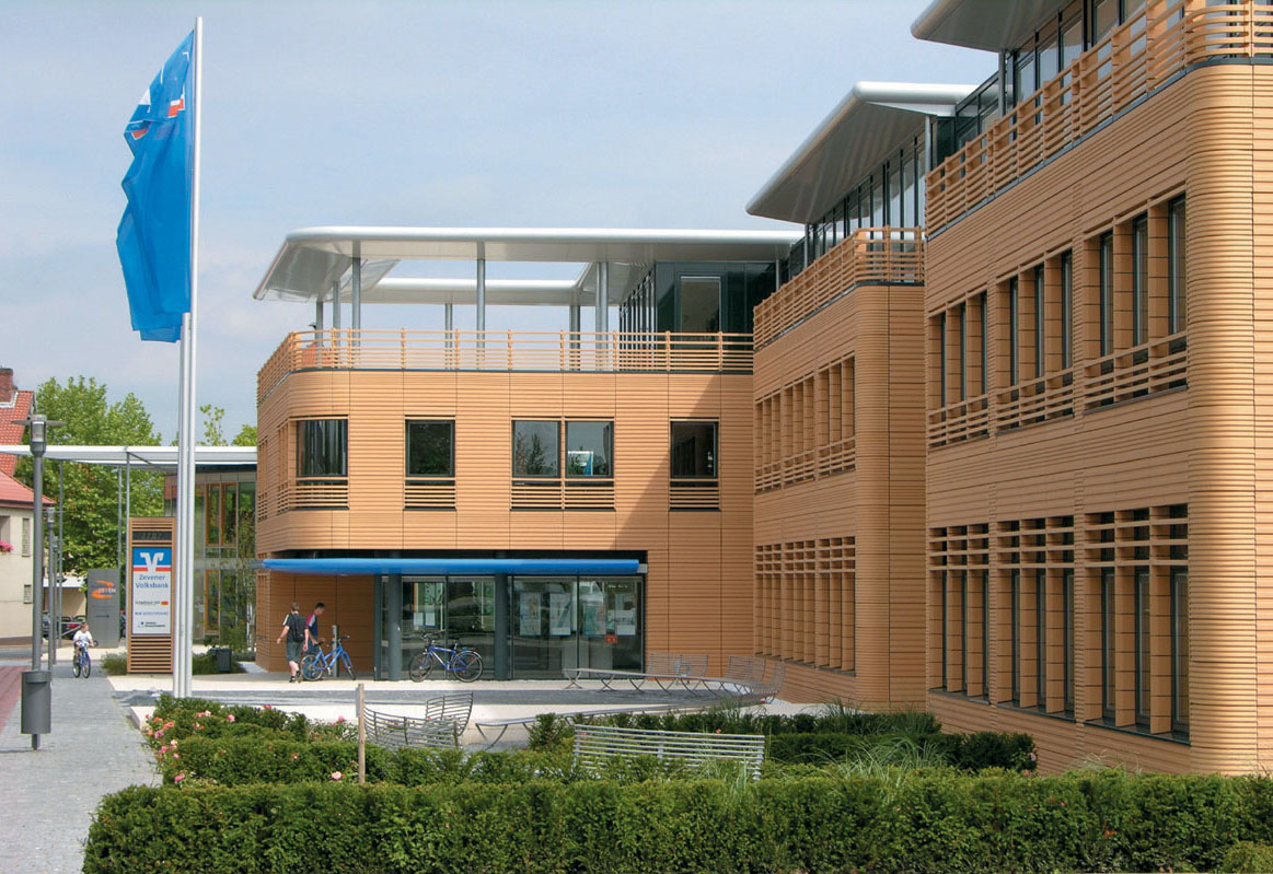 Geschäftsstelle Zeven